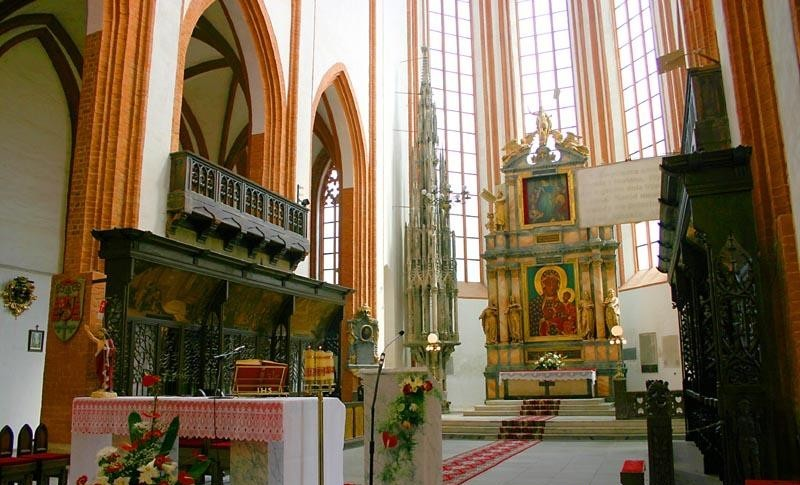 Wrocław, Poland